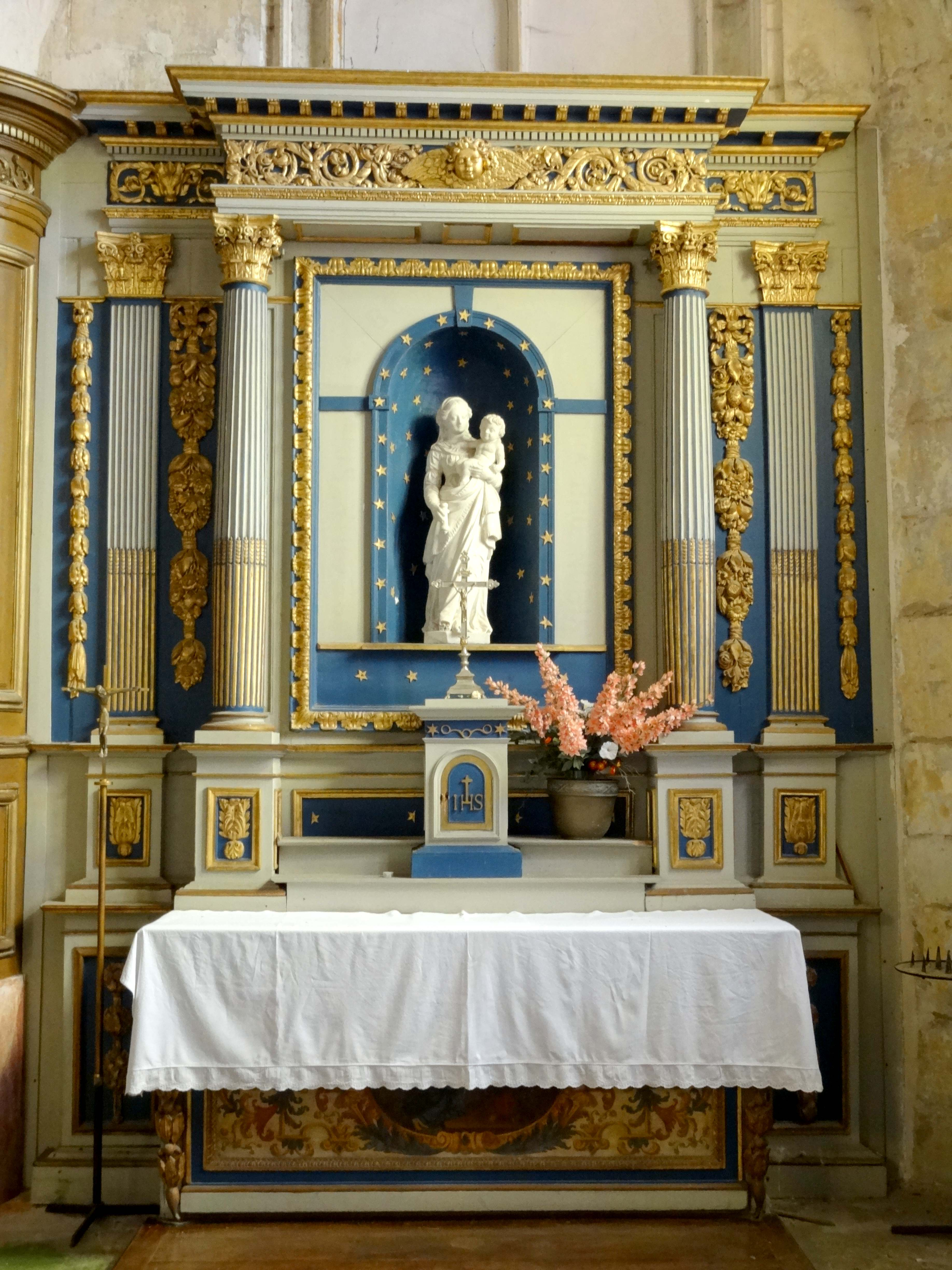 Mobilier de l'église - voir titre.